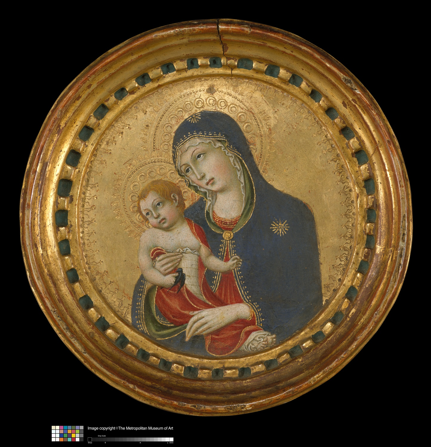 Sienese; Frame; Frames